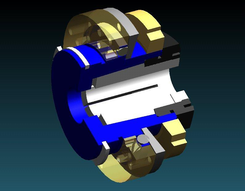 Sicherheitskupplung mit Festpunktschaltung im Schnitt